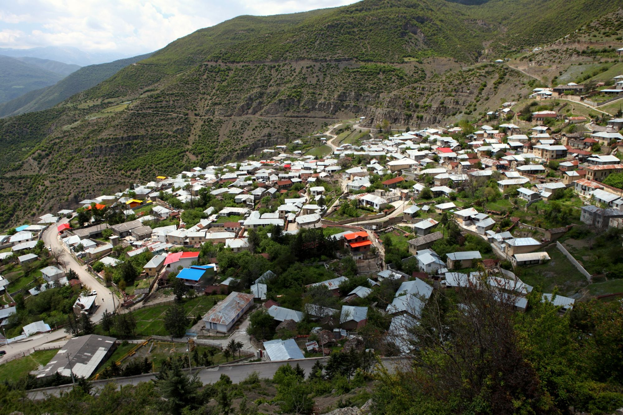 Alasht, Mazandaran, Iran